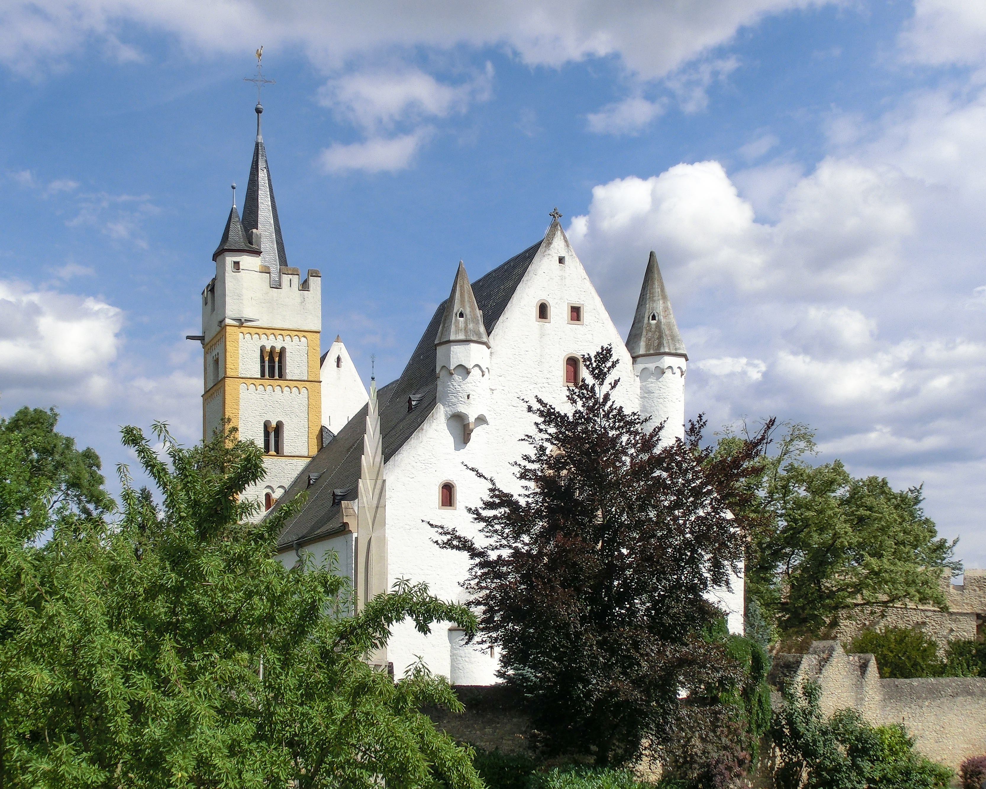 Die Burgkirche in Ingelheim am Rhein, Rheinland-Pfalz.